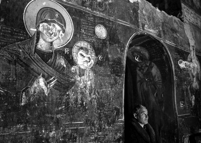 Косово и Метохија: српске фреске старе више од 8 векова на мети су вандала и терориста. Фотографија из пројекта "Корени душе". Фото:Дарко Дозет